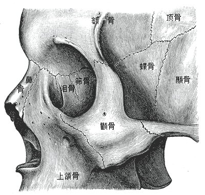 左颧骨（原位）。